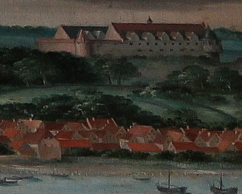 Der wesentiche Teil der Duburg auf dem Beyerschen Epitaph in St. Marien (Flensburg) von 1591